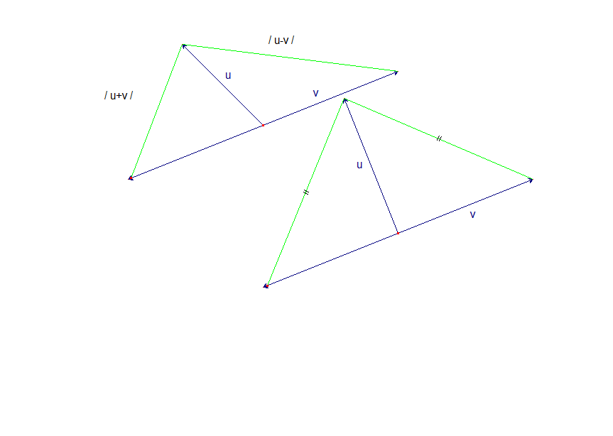 De la perpendicularite